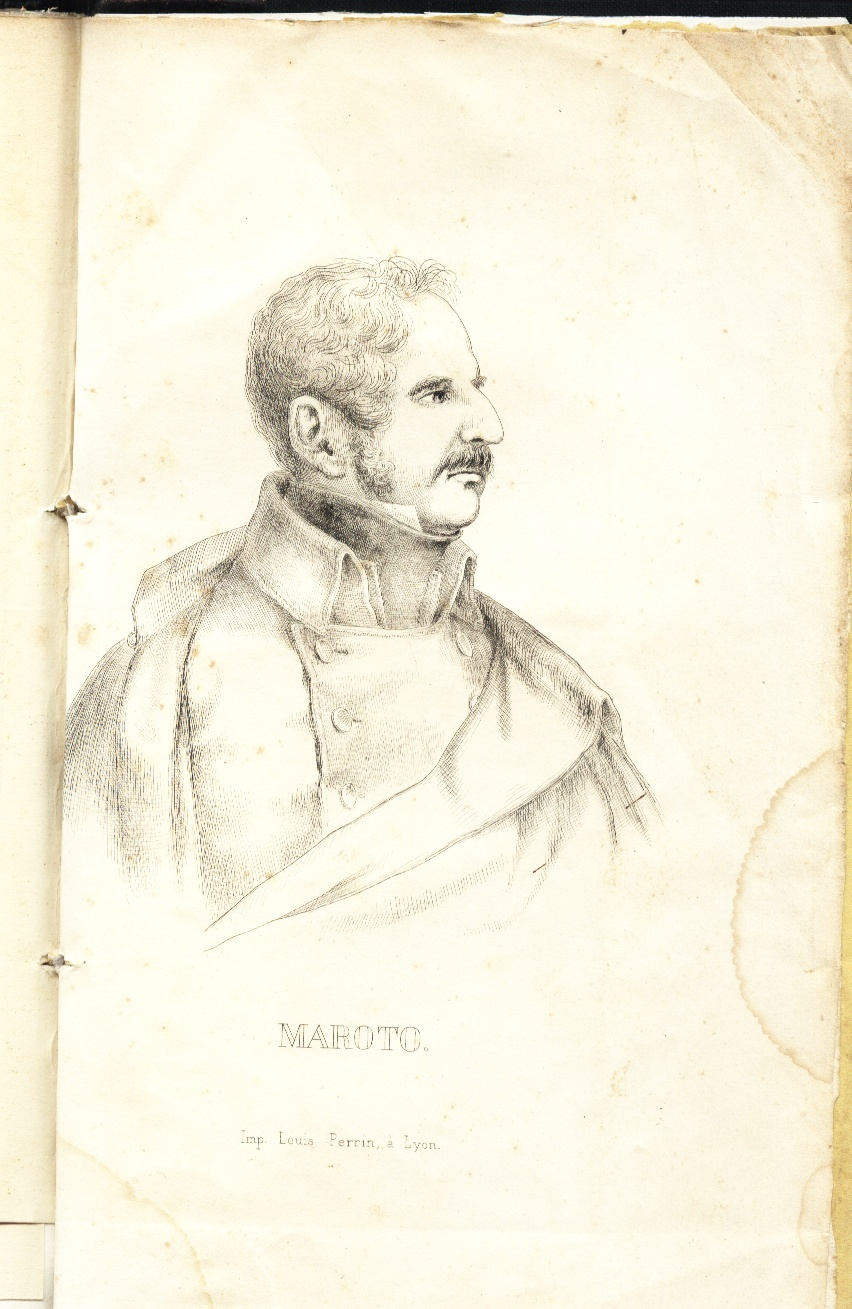 Rafael Maroto. Grabado de la obra "Memoires sur la guerre de la Navarre et des Provinces Basques". Alphonse de Barrés de Molard. Paris-Lyon 1842